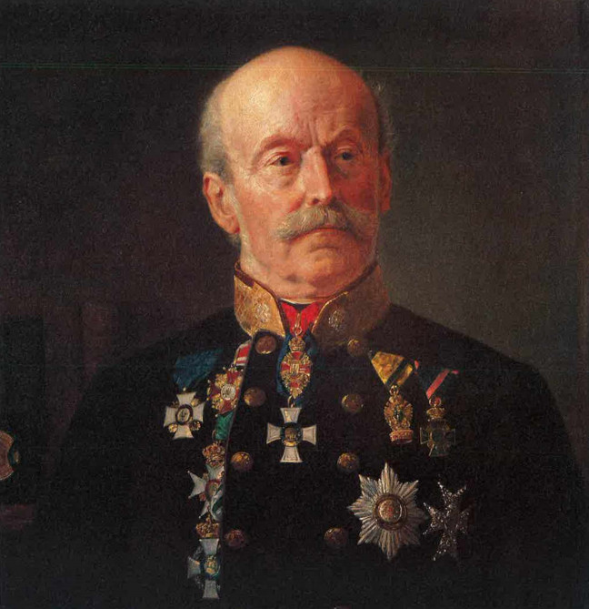 Peter Tunner (1809–1897), österreichischer Bergbaupionier und Politiker, Landtagsabgeordneter